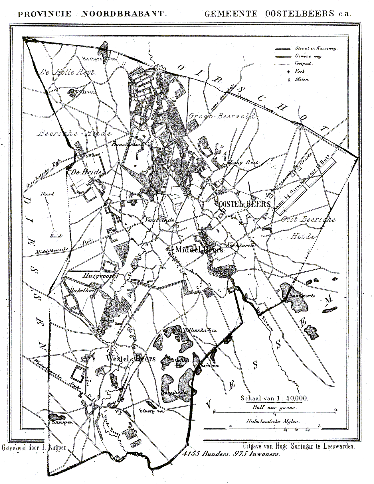 Nederland, Noord-Brabant, Gemeente Oostelbeers